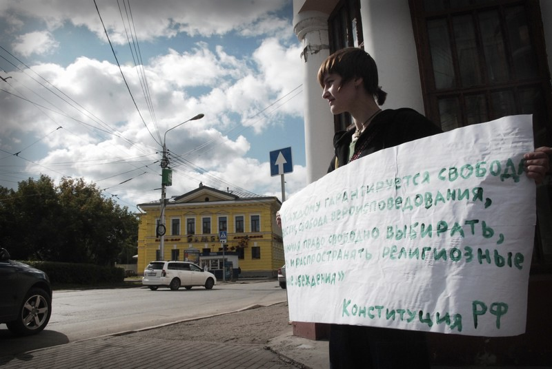 Одиночный пикет у здания Ленинского районного суда города Томска в день первого судебного заседания по делу о признании книги "Бхагавад-гита как она есть" экстремистским материалом.